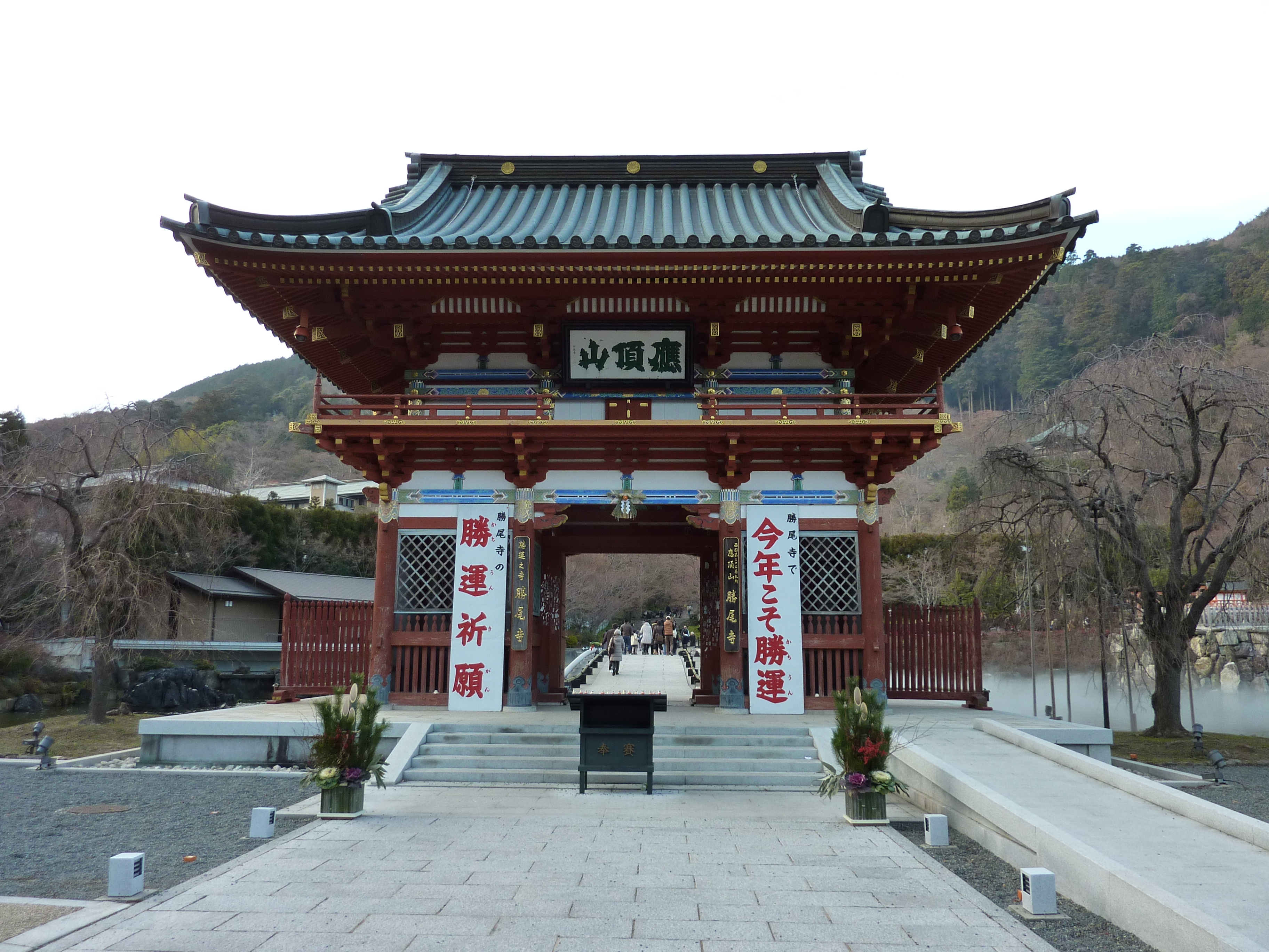 勝尾寺（大阪府箕面市）山門。2014年正月に撮影。